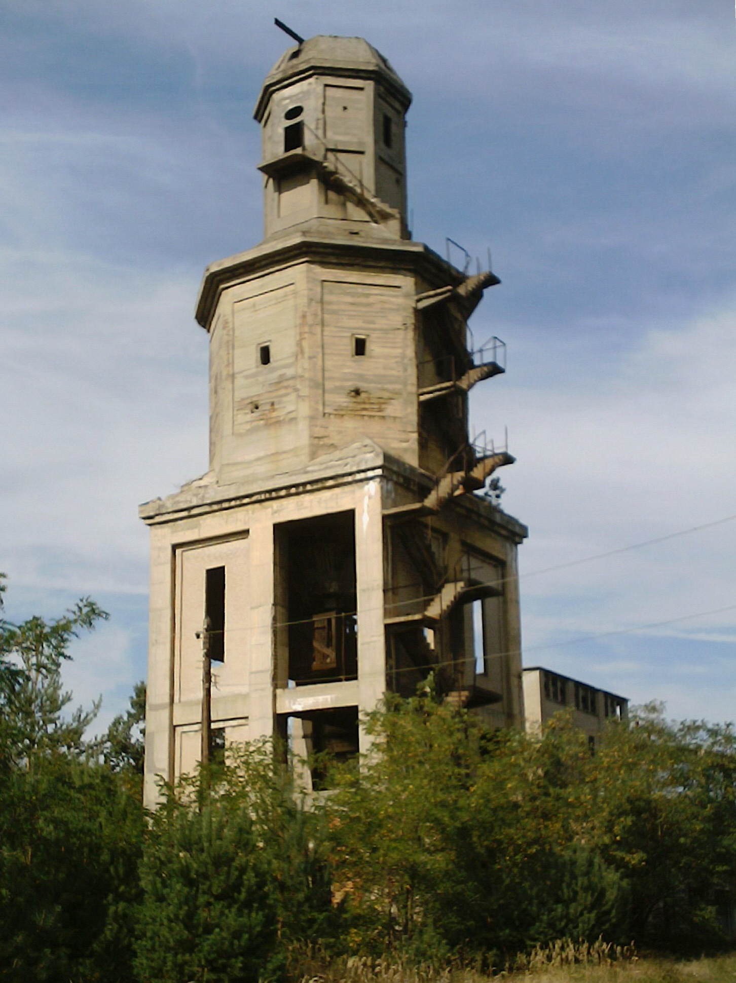 Berzitturm_Kahla